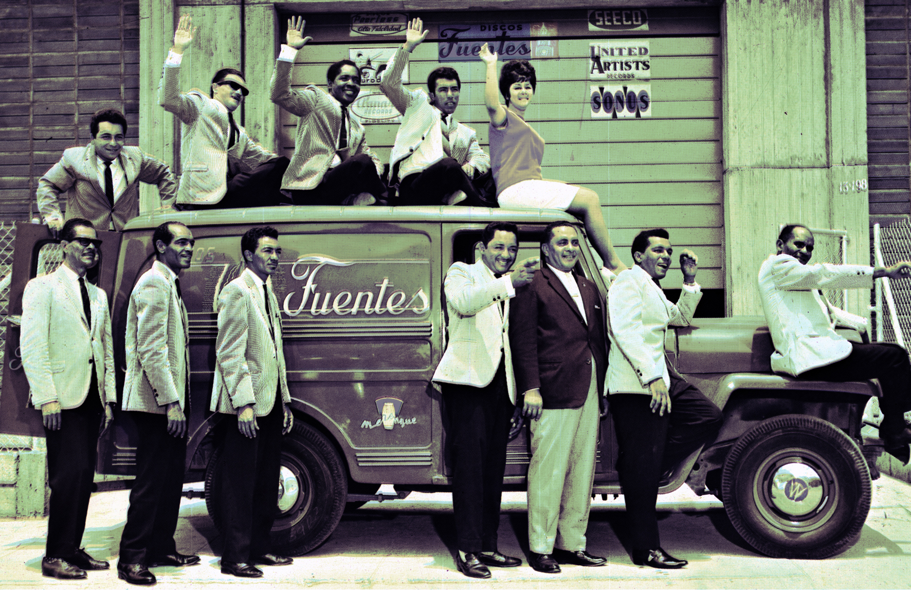 Una de las primeras formaciones de Los Corraleros de Majagual